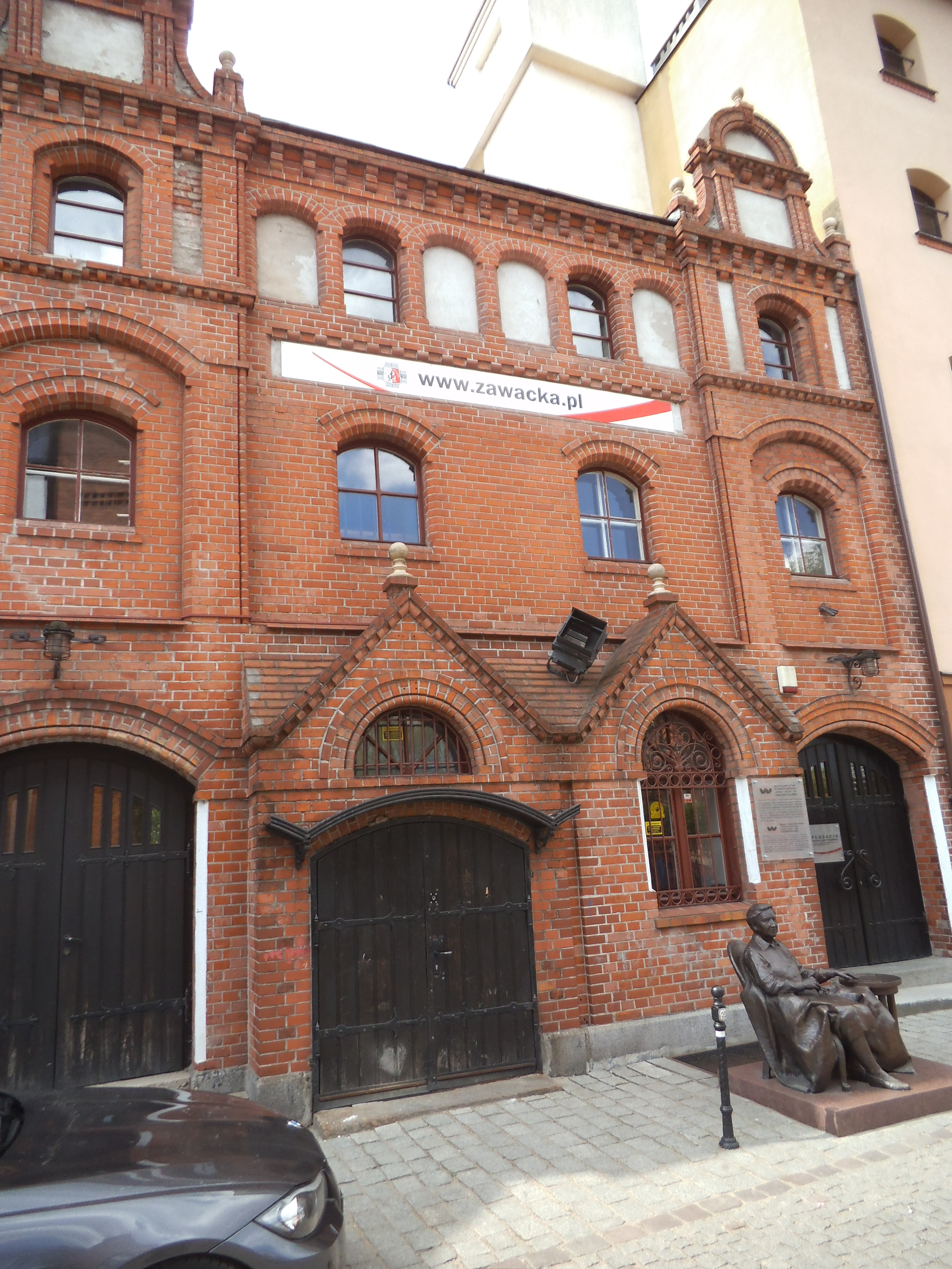 Fundacja Generał Elżbiety Zawackiej w Toruniu